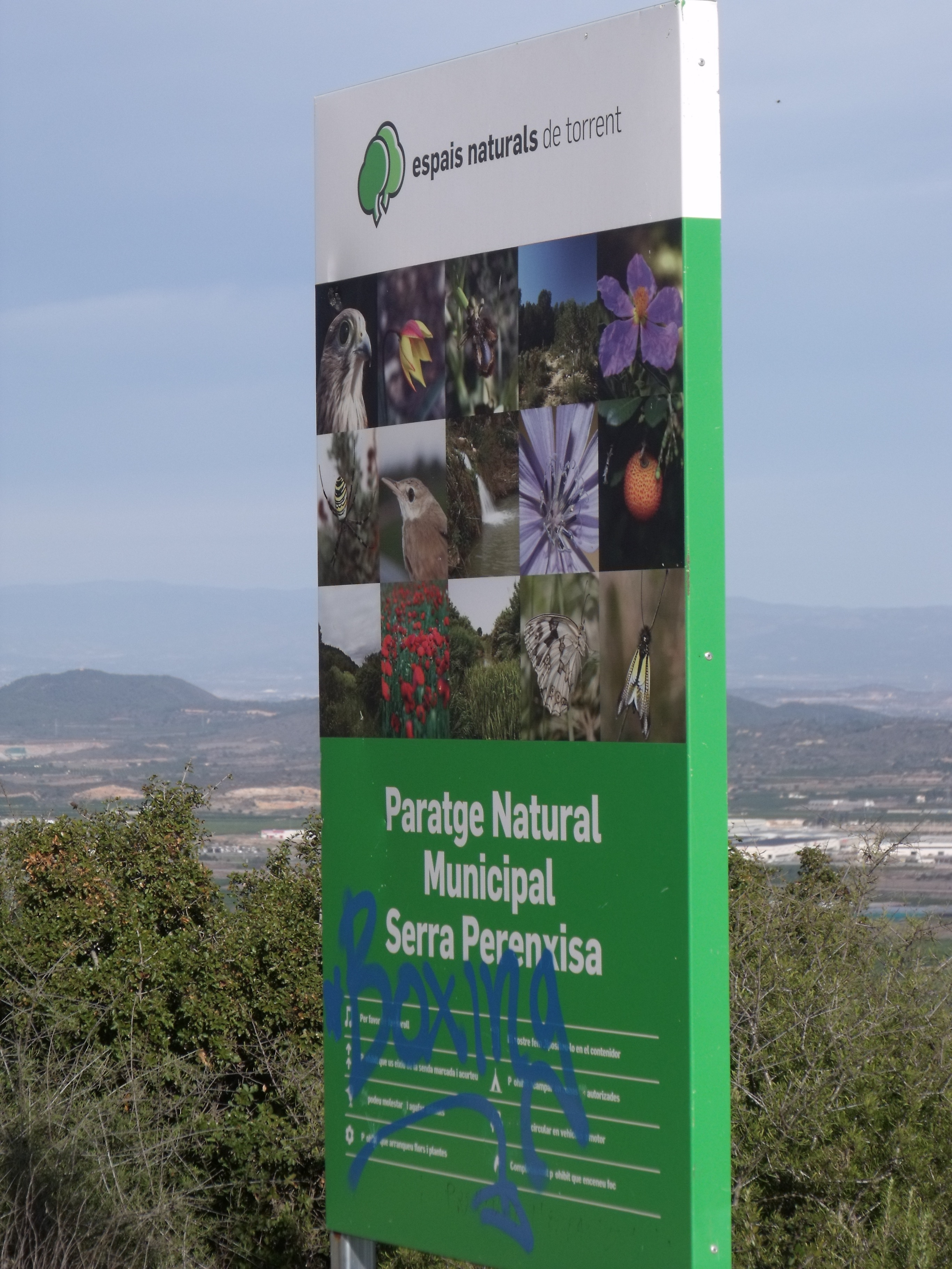 Cartel del Paraje Natural Municipal de la Sierra Perenxisa, en término de Torrente. Ha sufrido vandalismo.